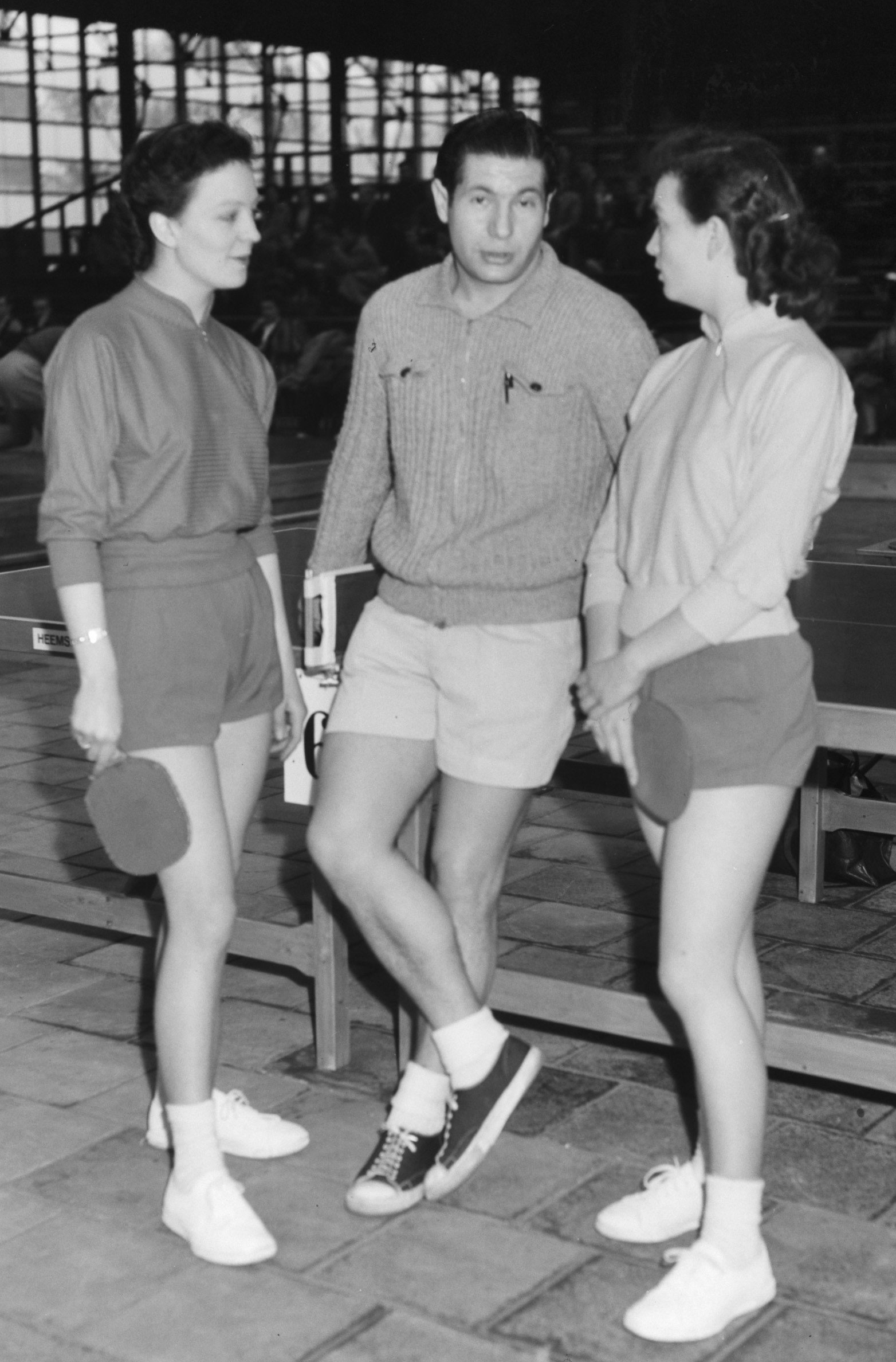 Tafeltenniskampioenschappen Diane Rowe (Eng.) , Bergman (Eng.) en Rosalina Rowe (Eng.)